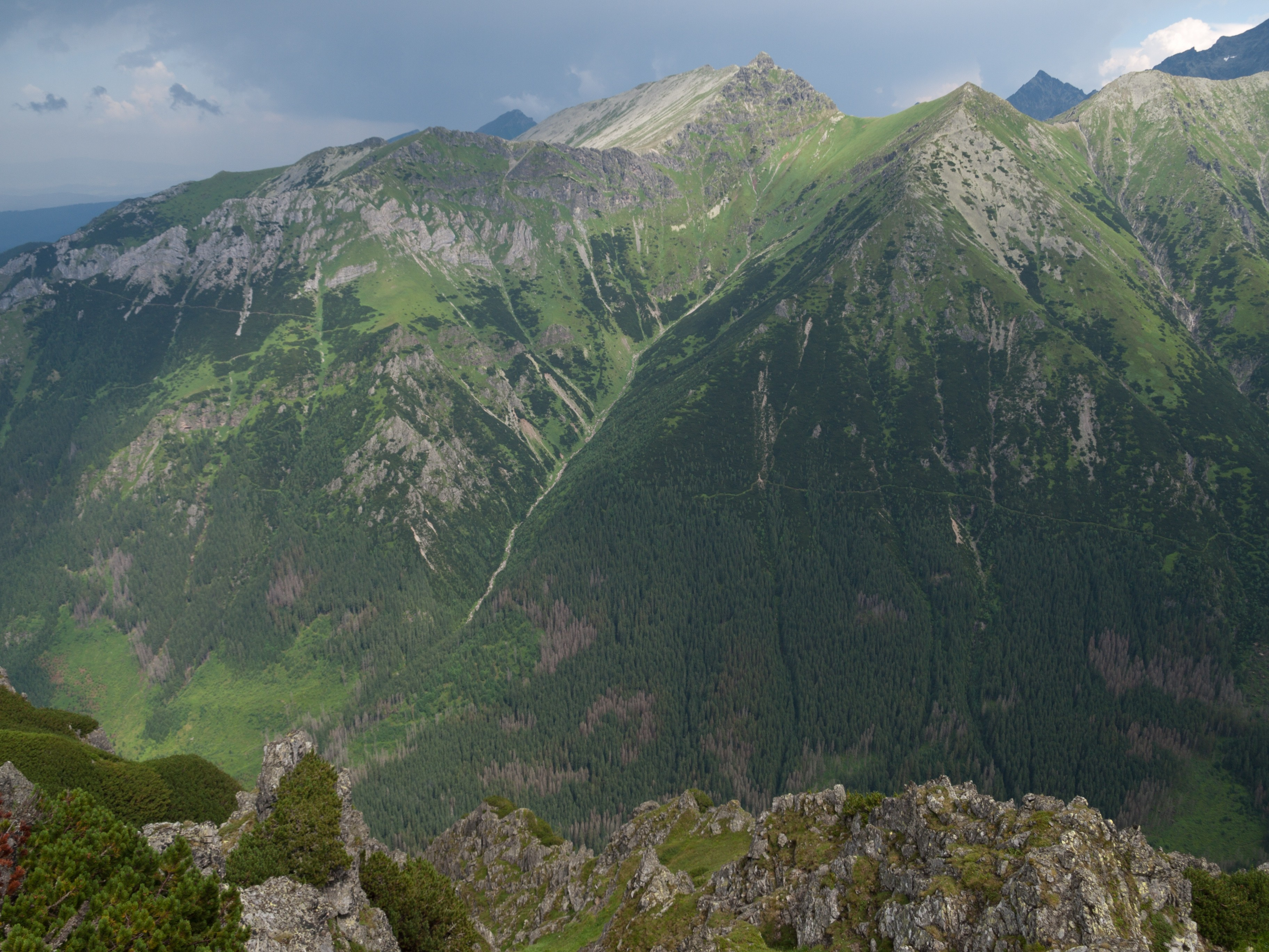 Litworowy Żleb między Szeroką Jaworzyńską a Zieloną Czubą